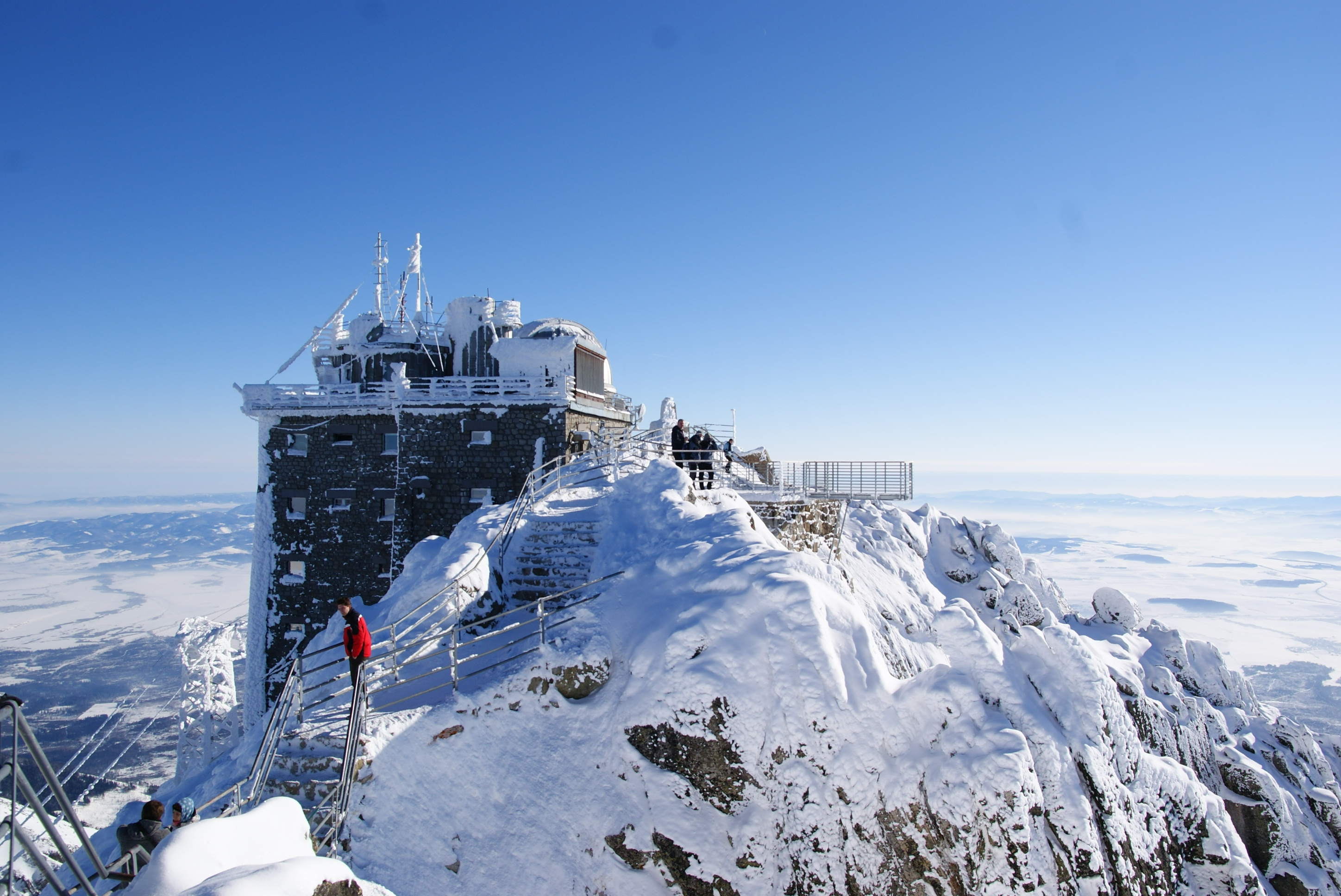 STANICA LANOVKY S OBSERVATÓRIOM